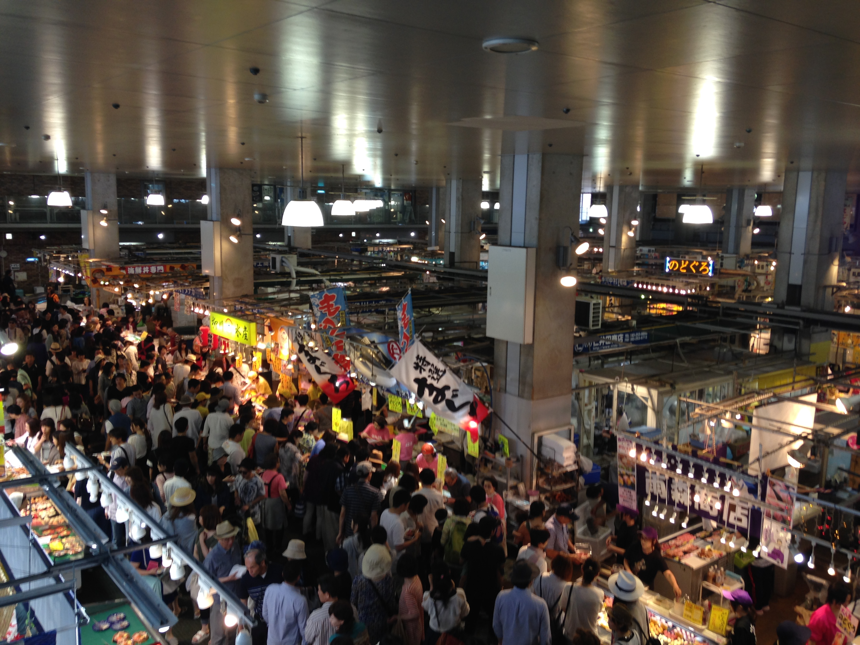 唐戸市場内部の様子